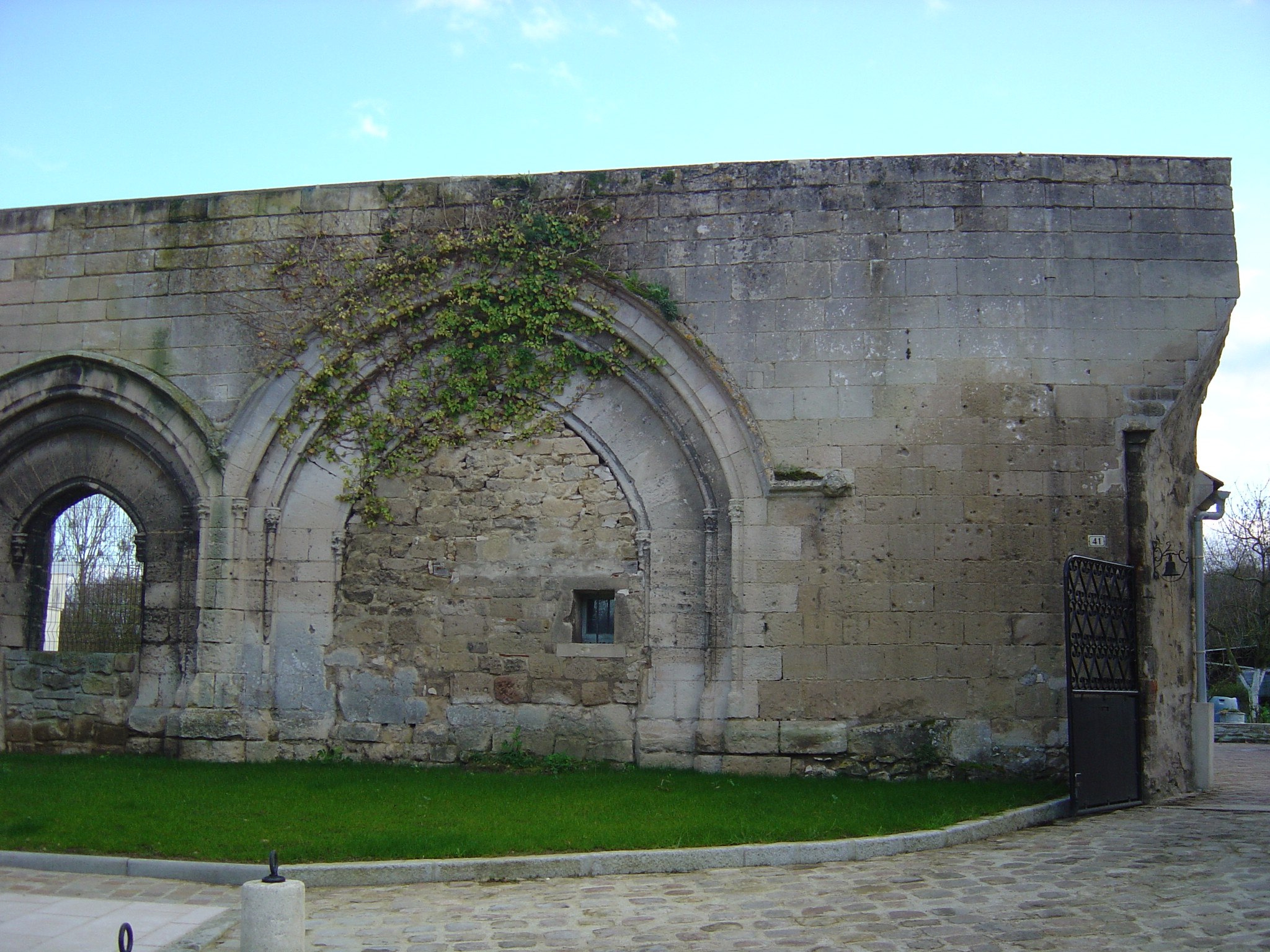 photo du double portail des anciens bâtiments de la prévôté d'Angicourt